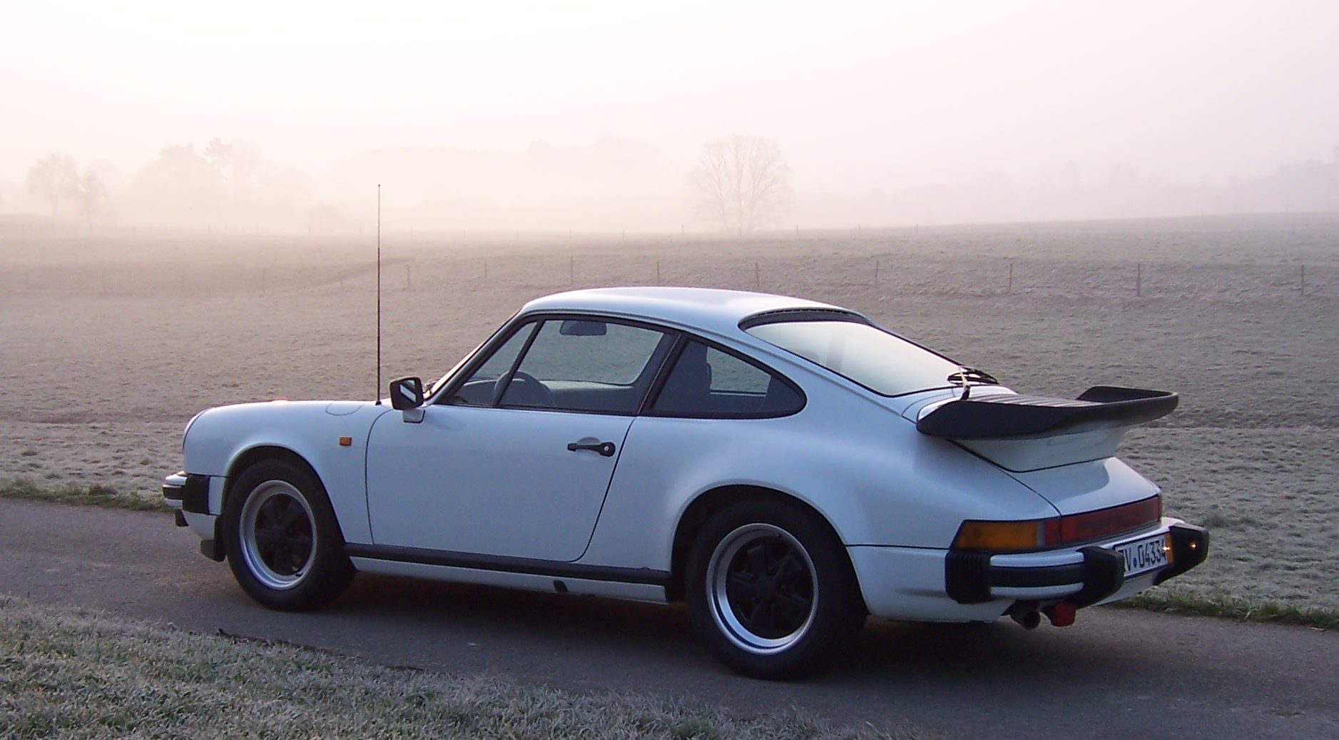 1981 Porsche 911 SC mit WTL (Werks-Turbo-Look) am 16.03.2007 bei Ravensburg